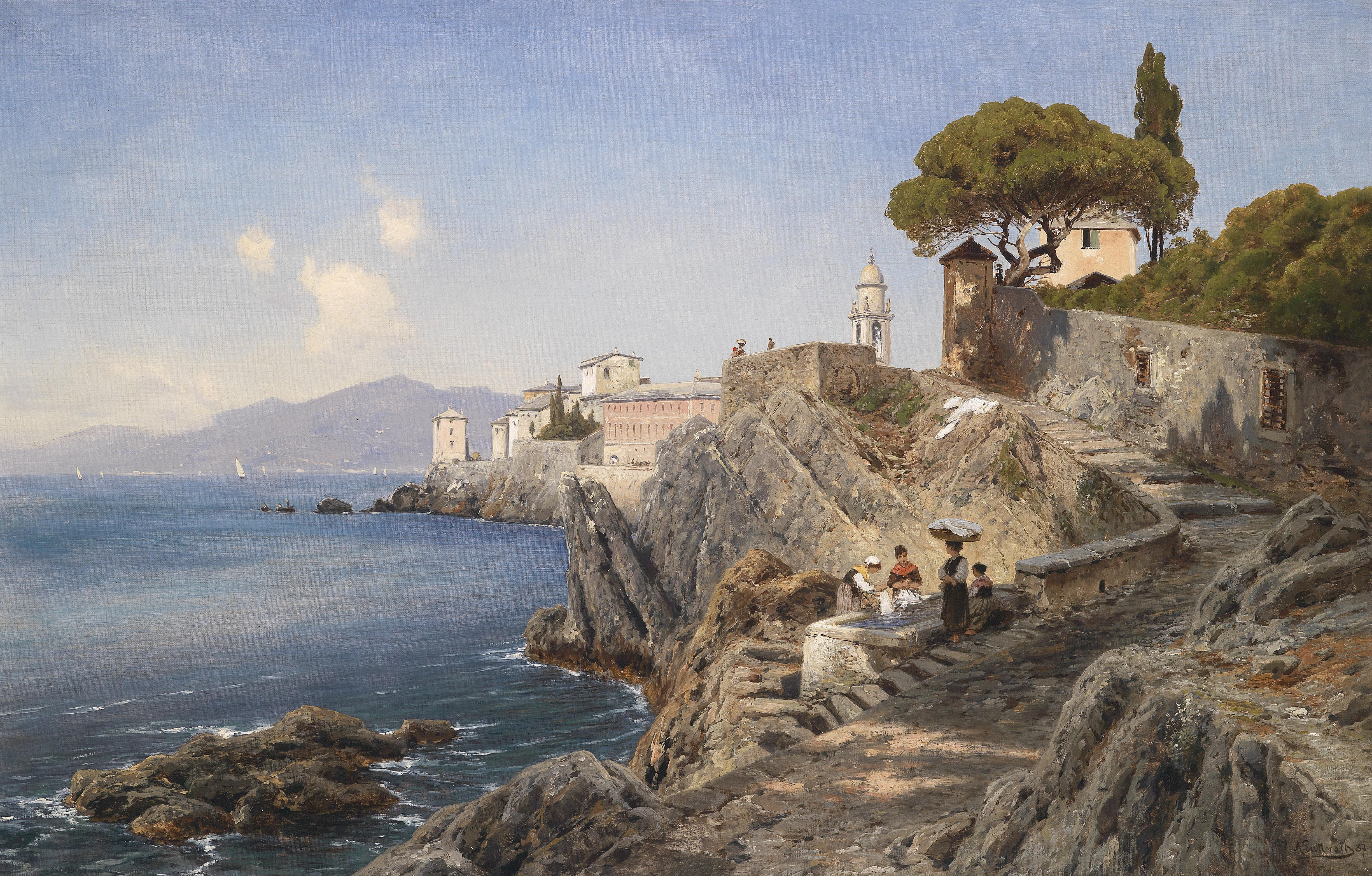 Am Ufer vor Sturla bei Genua, signiert, datiert A. Lutteroth(18)87, Öl auf Leinwand, 65 x 100 cm